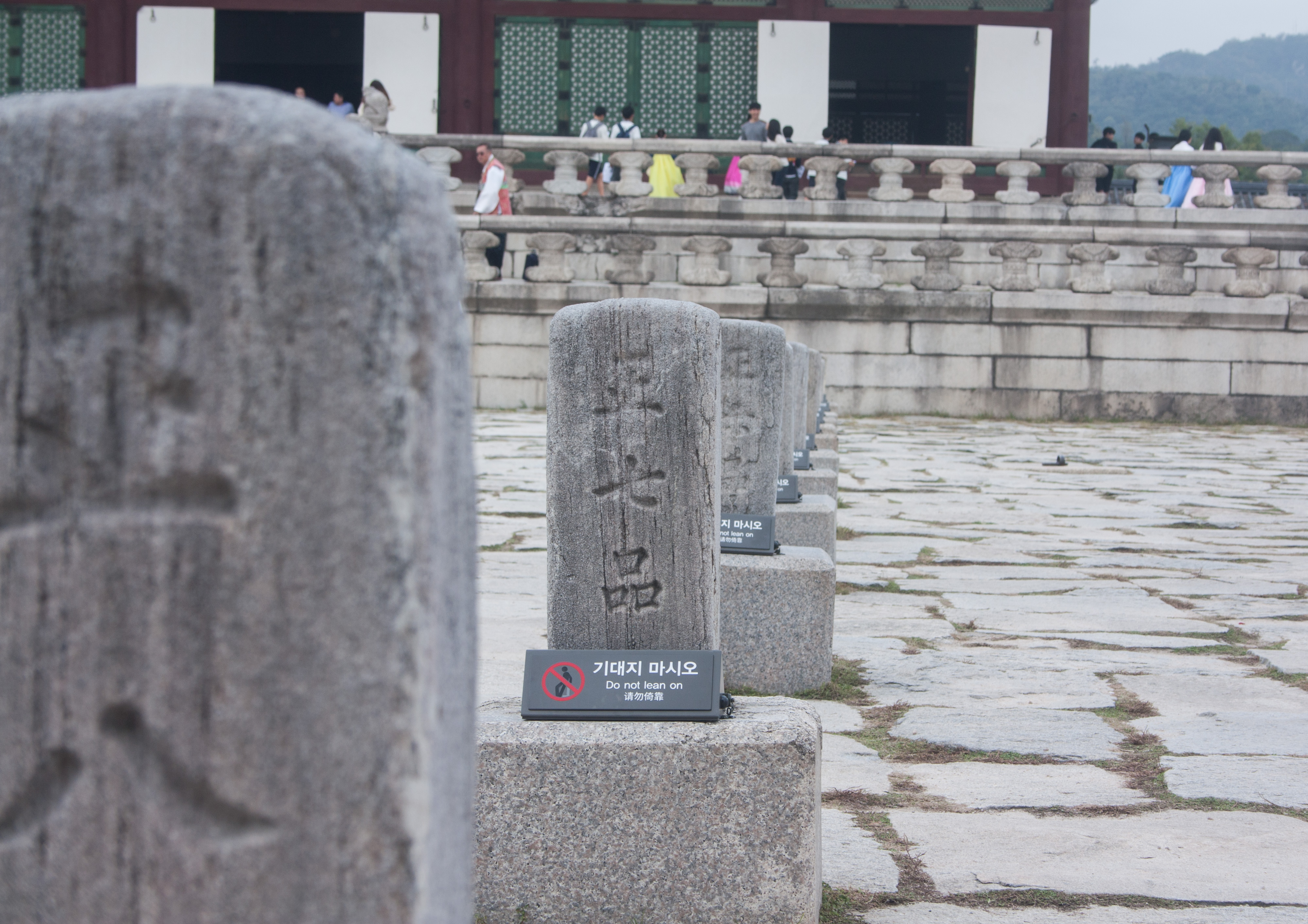 서울시 종로구, 경복궁